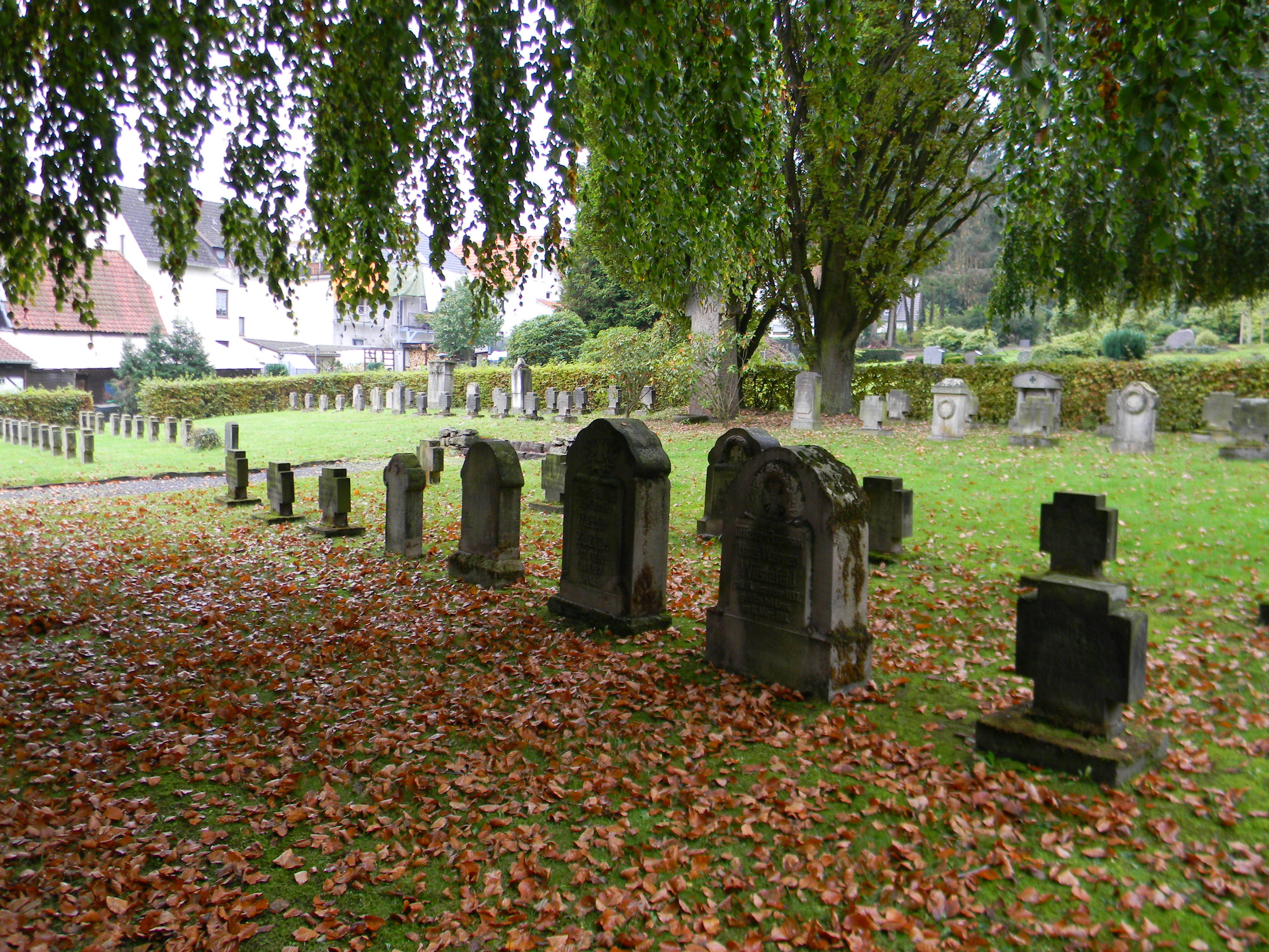 Kriegsgräber auf dem Friedhof Neumünden in Hann. Münden (Landkreis Göttingen).